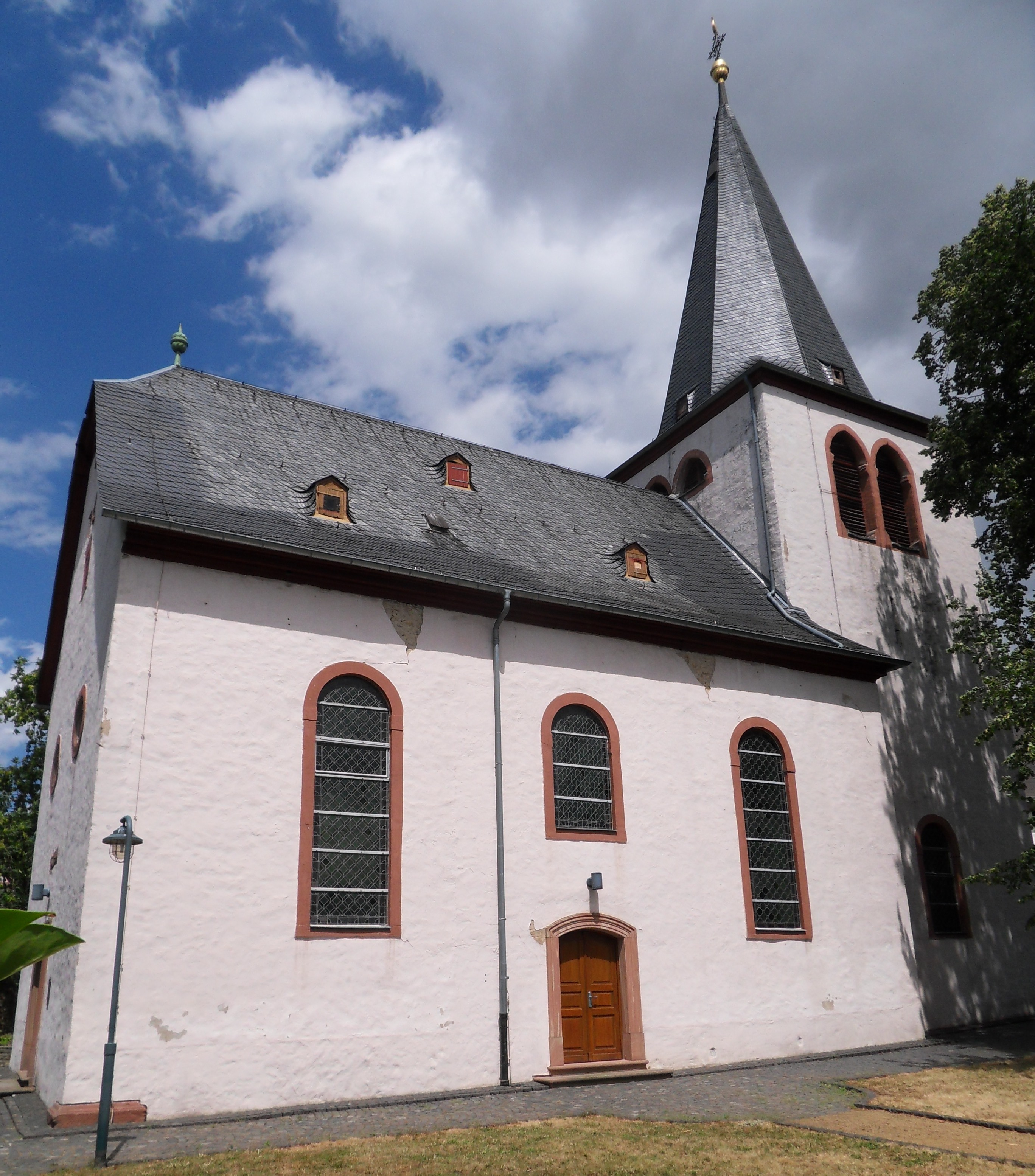 Blick von Süden über den Kirchhof zur Dorfkirche in Massenheim